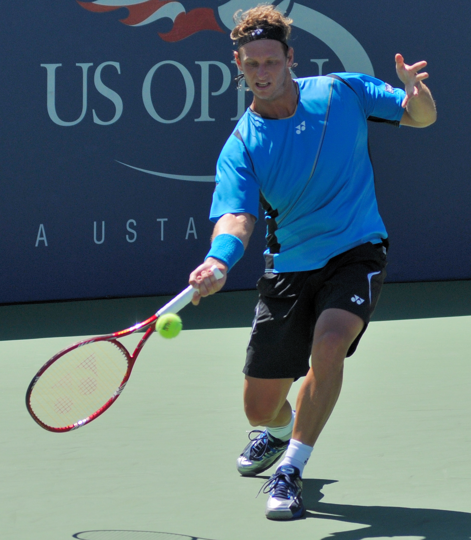 David Nalbandian - US Open 2010